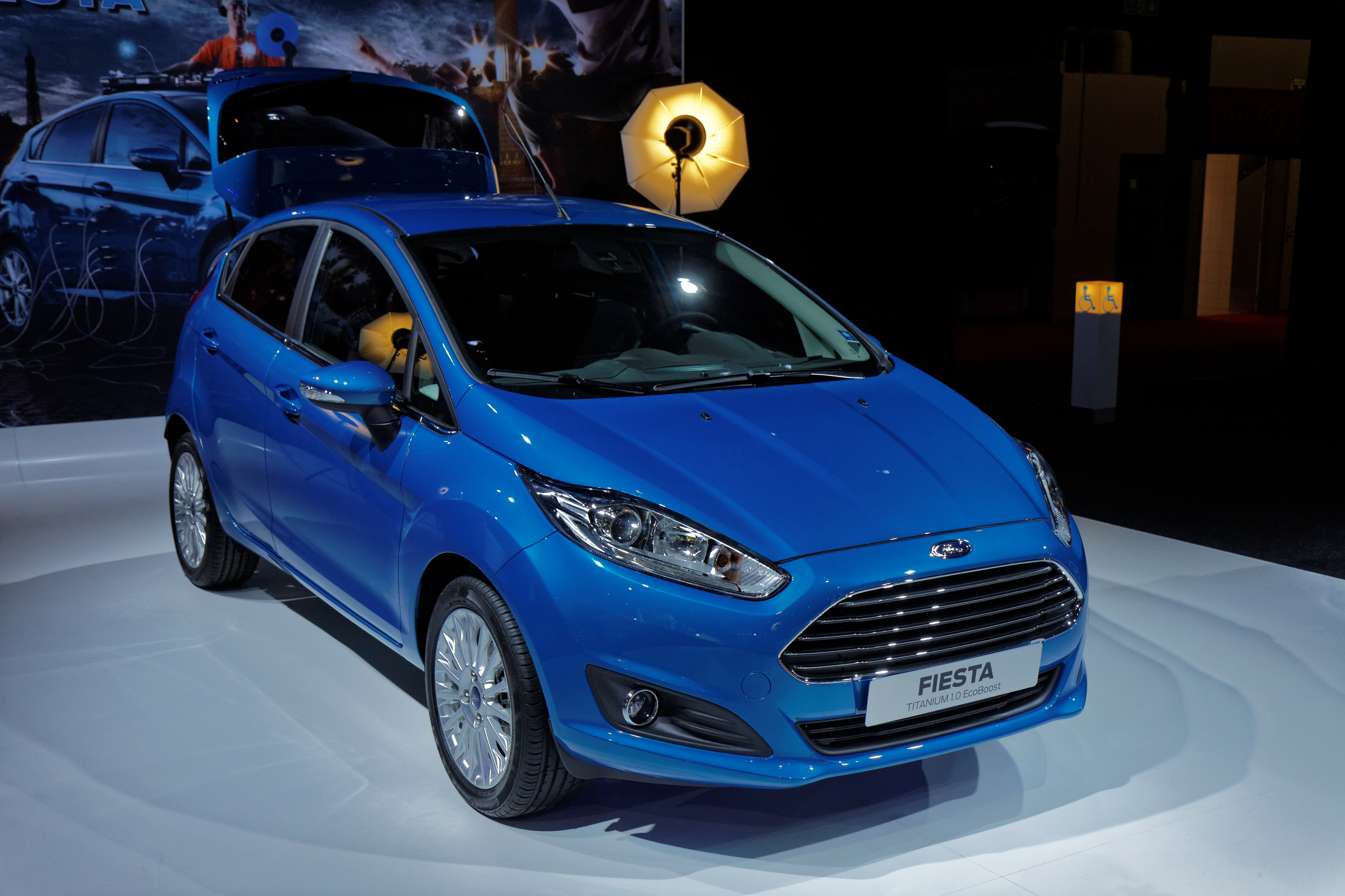 La Ford Fiesta présentée lors du Mondial de l'Automobile de Paris 2012.